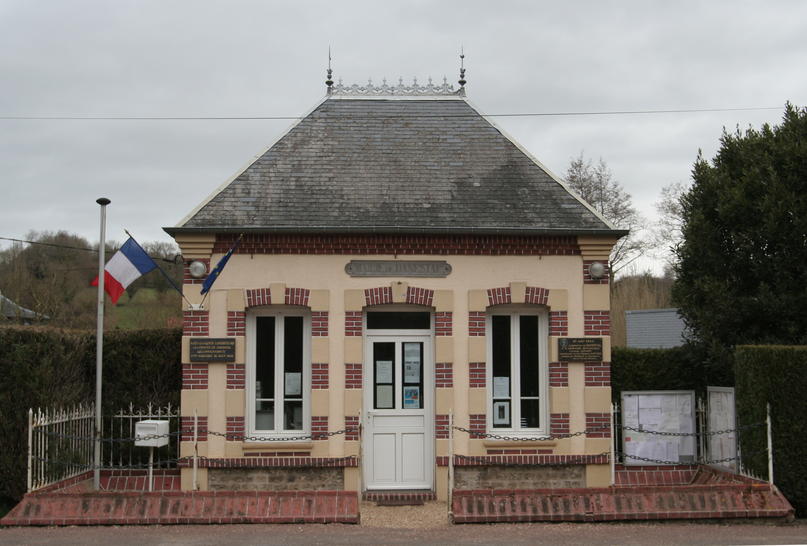 Mairie de Danestal.